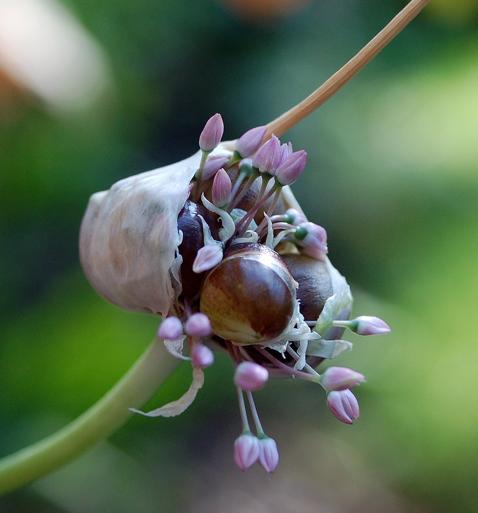 Blommande vitlök